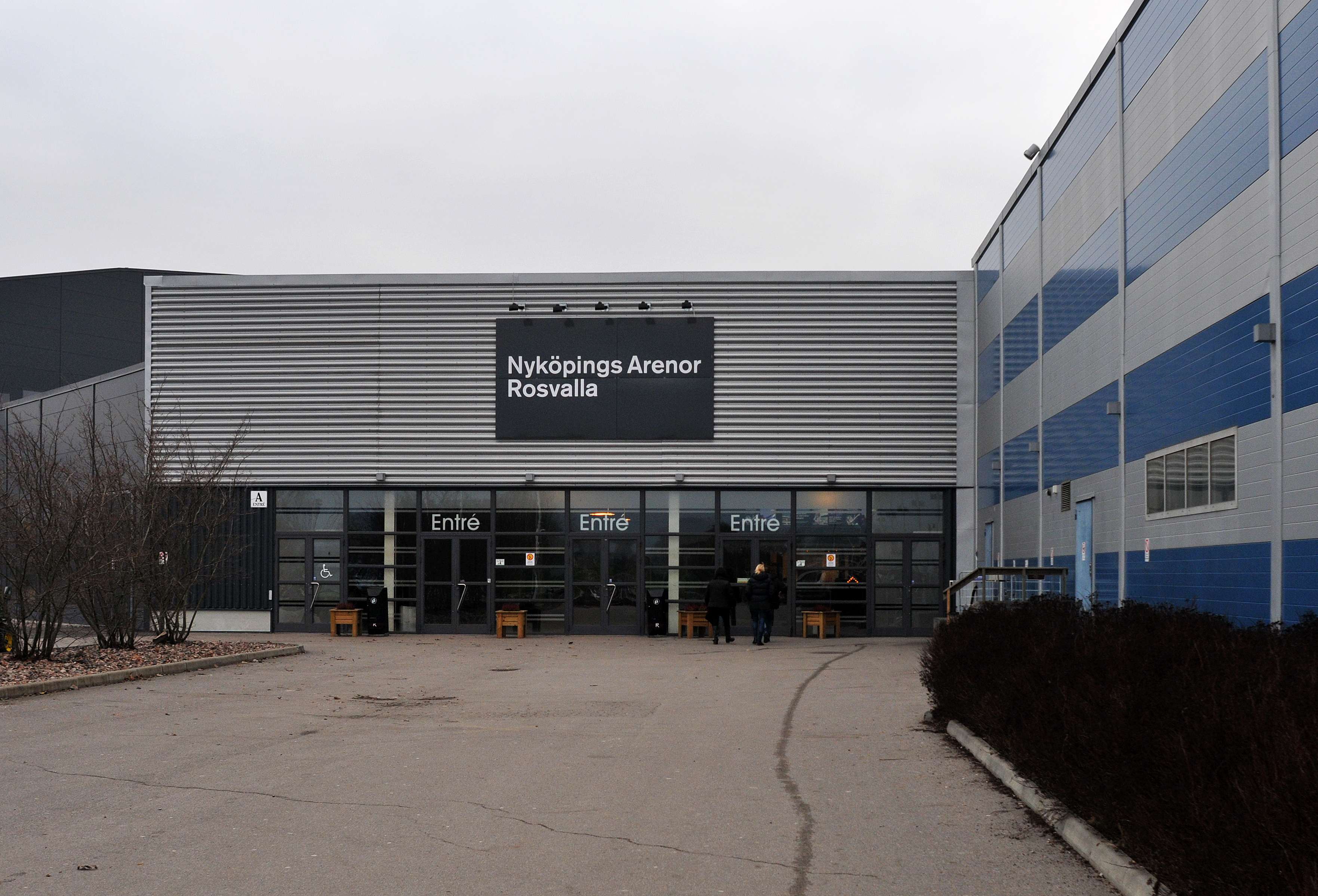 Entré Nyköpings Arenor Rosvalla.